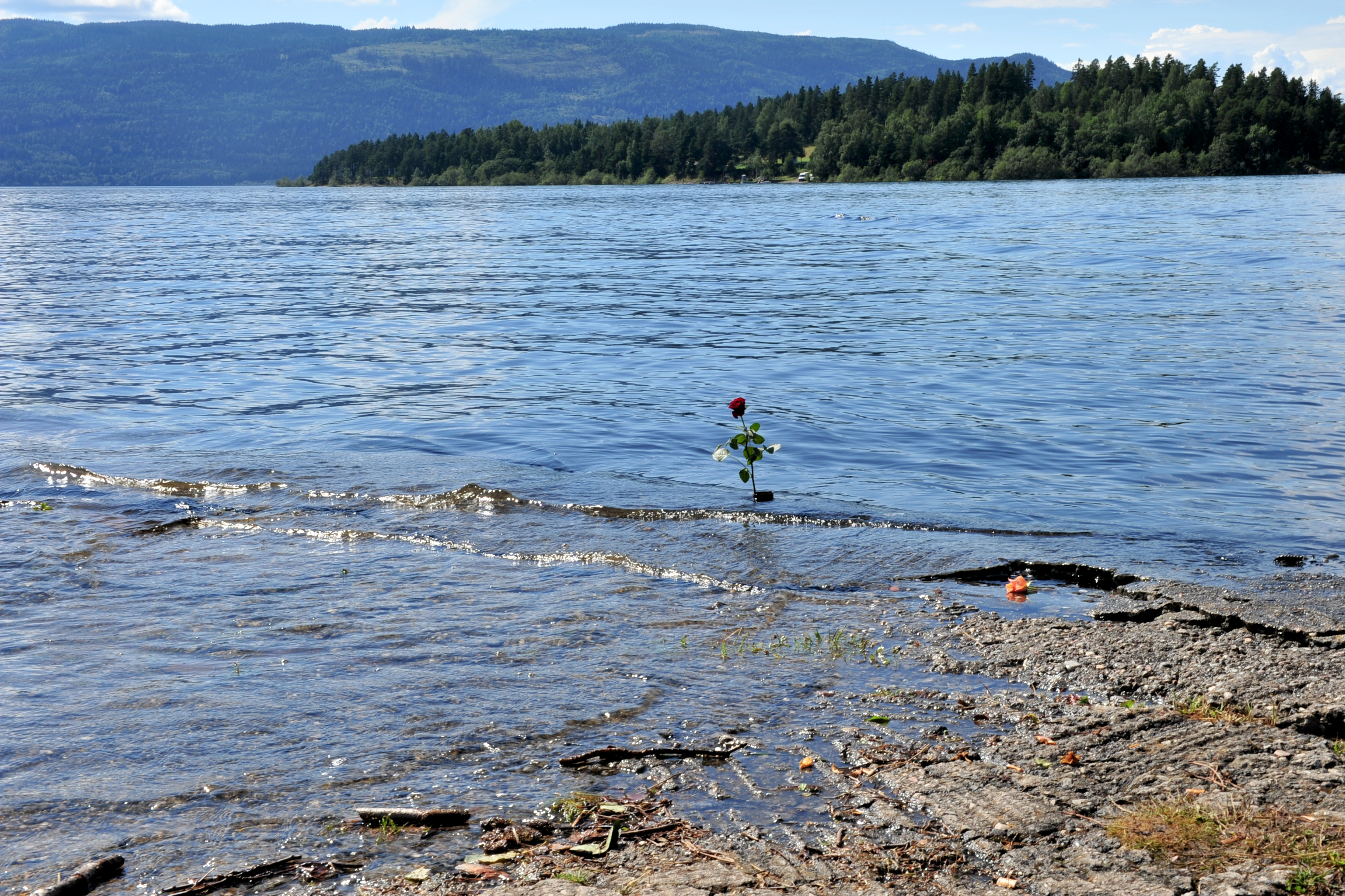 Utøya, the site of the Norwegian Labur Partys youth camp. Utøya, åstedet for terroranslaget mot AUF.